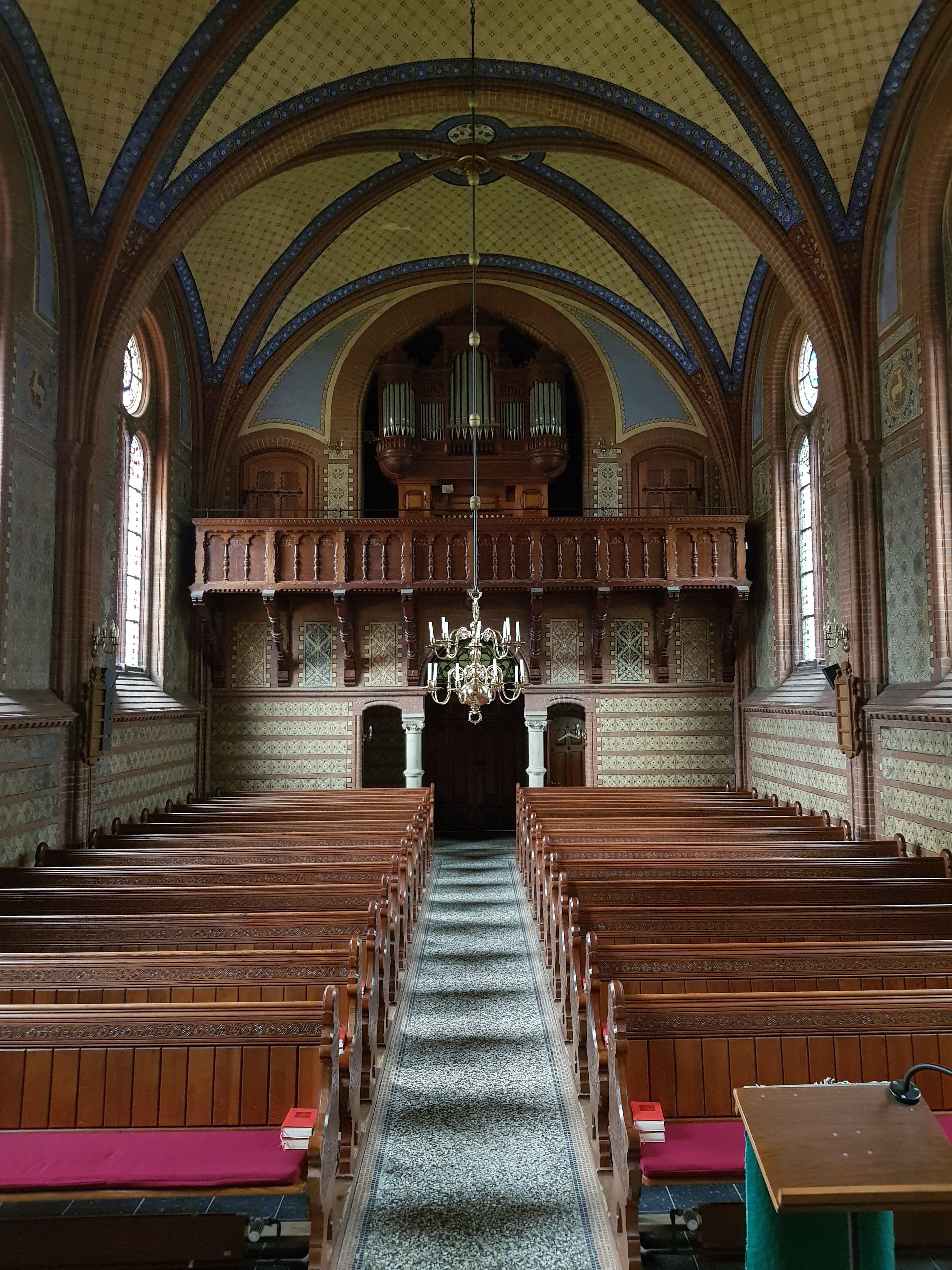 Innenraum